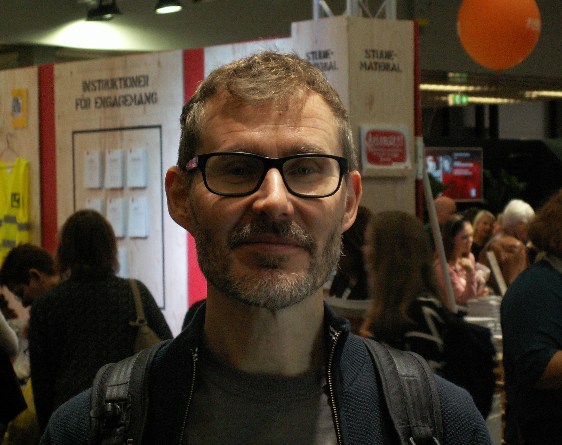 Olof Siverbo på Bokmässan 2018.